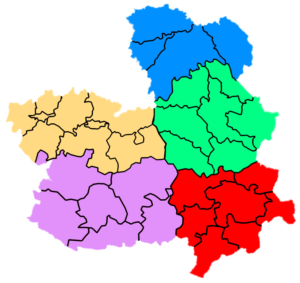 Comarcas de Castilla-La Mancha